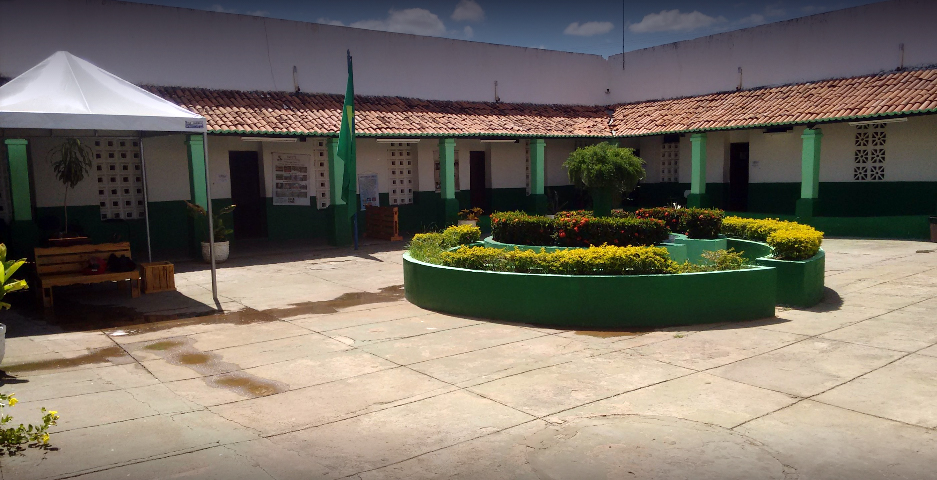 Pátio Interno do Instituto Juazeiro de Educação Superior